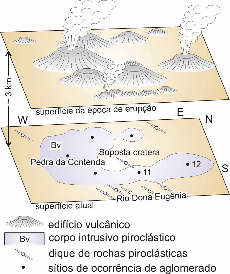 Subvolcanic structure of Nova Iguaçu area, Rio de Janeiro, Brazil